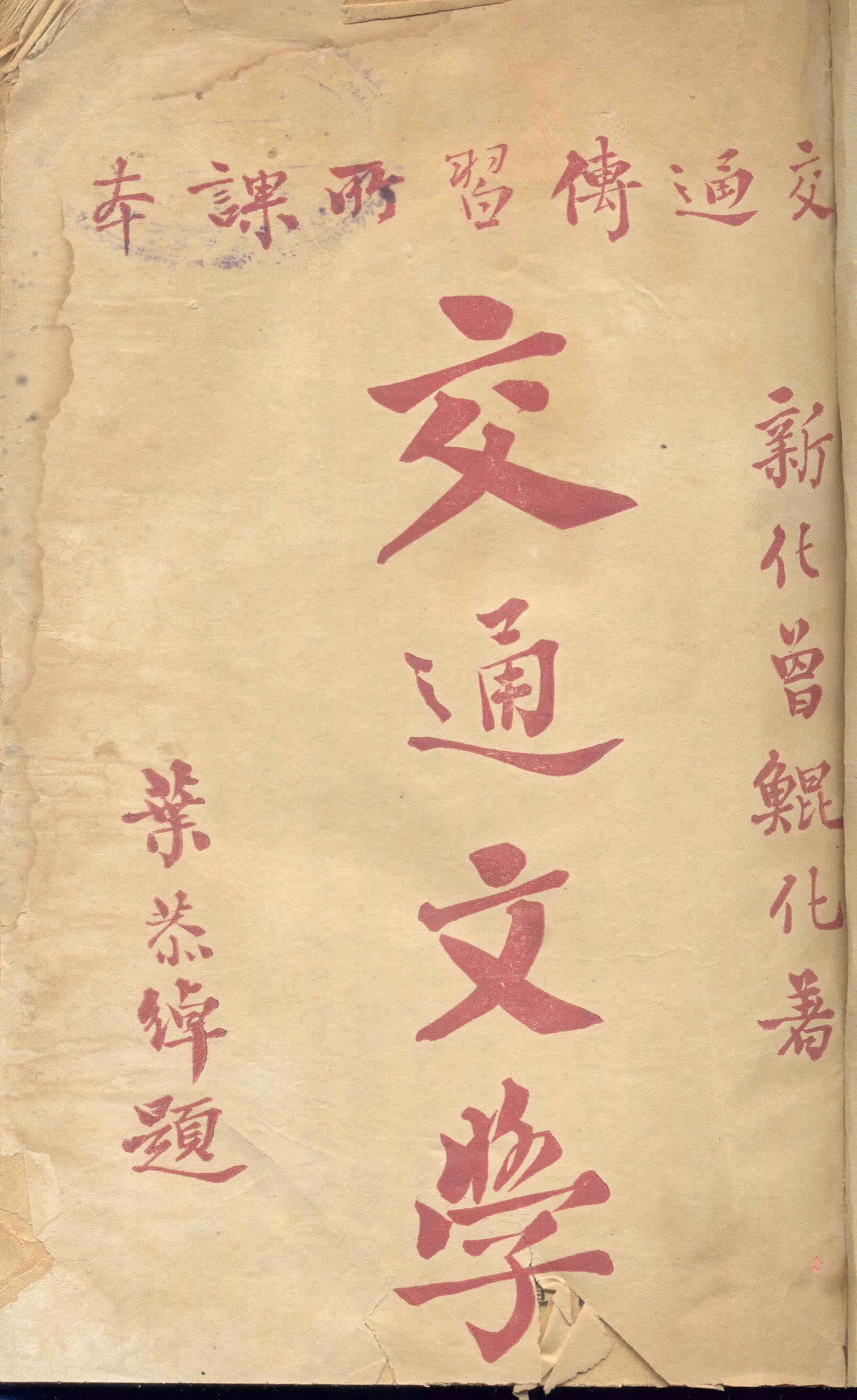 北京交通大学早期教材